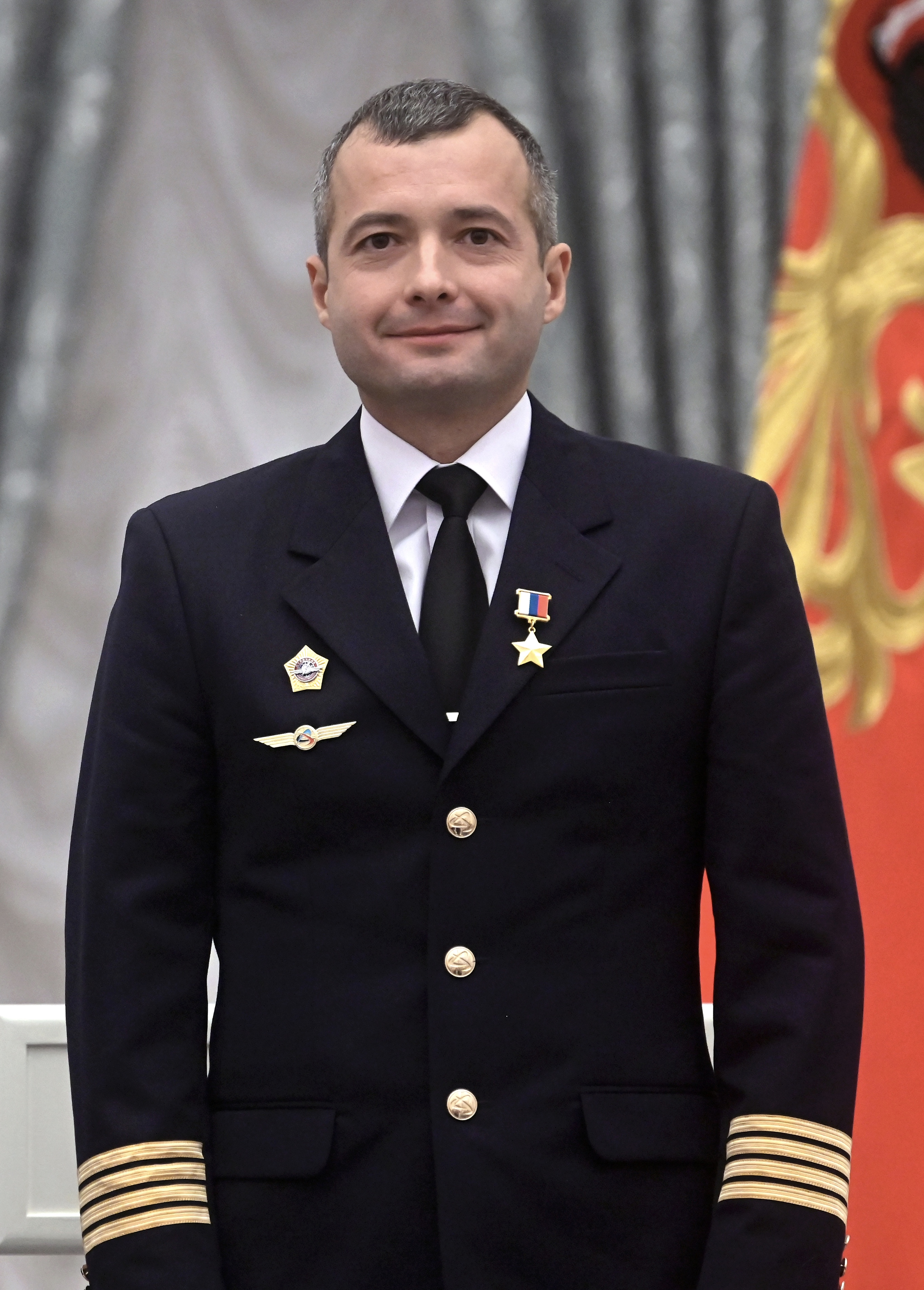 г. Москва, Кремль, Екатерининский зал, 21 ноября 2019 года. Президент РФ Владимир Путин наградил медалью «Золотая Звезда» командира воздушного судна ОАО АК «Уральские авиалинии» Дамира Юсупова, удостоенного звания Героя Российской Федерации.